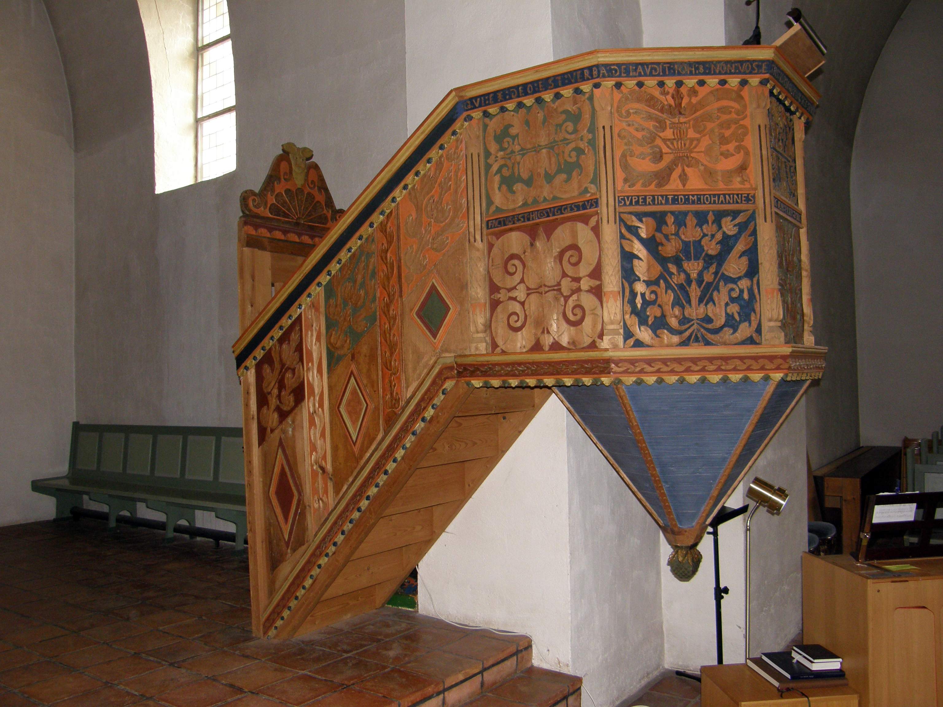 Norderhov kirke, Ringerike (prekestolen, ca. 1580)